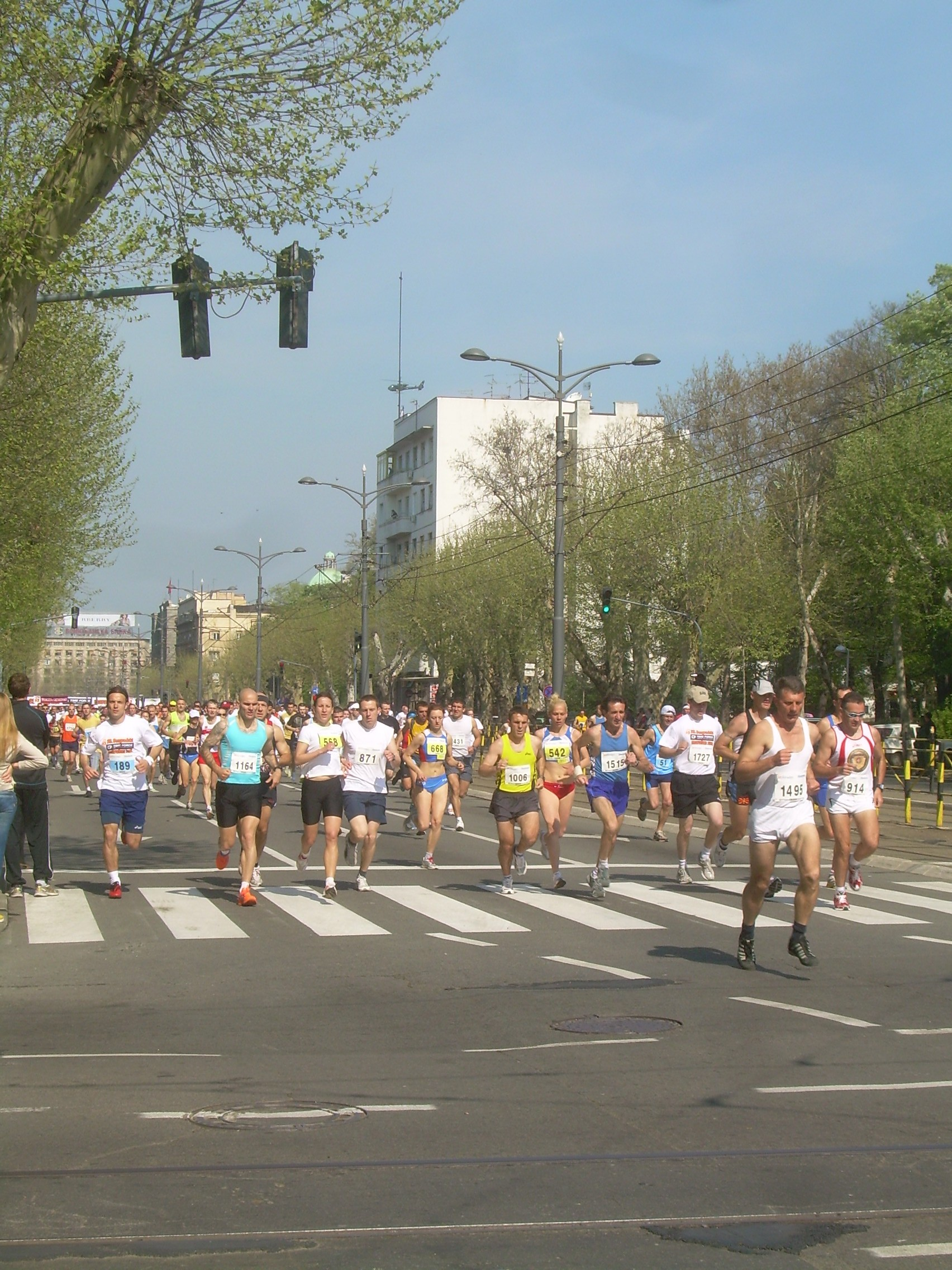 23. Београдски маратон, старт трке. Фотографија направљена 18. априла 2010.